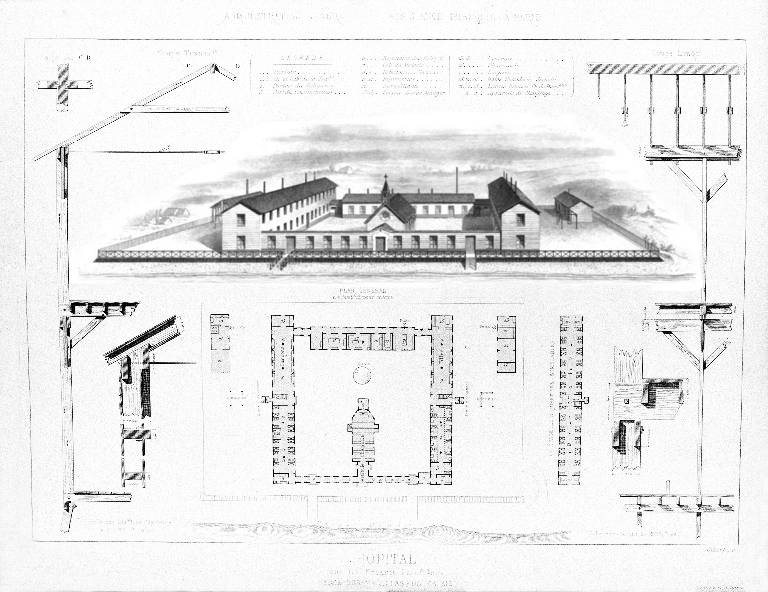 Dessin d'architecte avec des détails de construction, le plan au sol du bâtiment et une vue "artistique". Il s'agit de la version finalisé quelques mois après l'ouverture, avec la galerie ajoutée face à la mer.